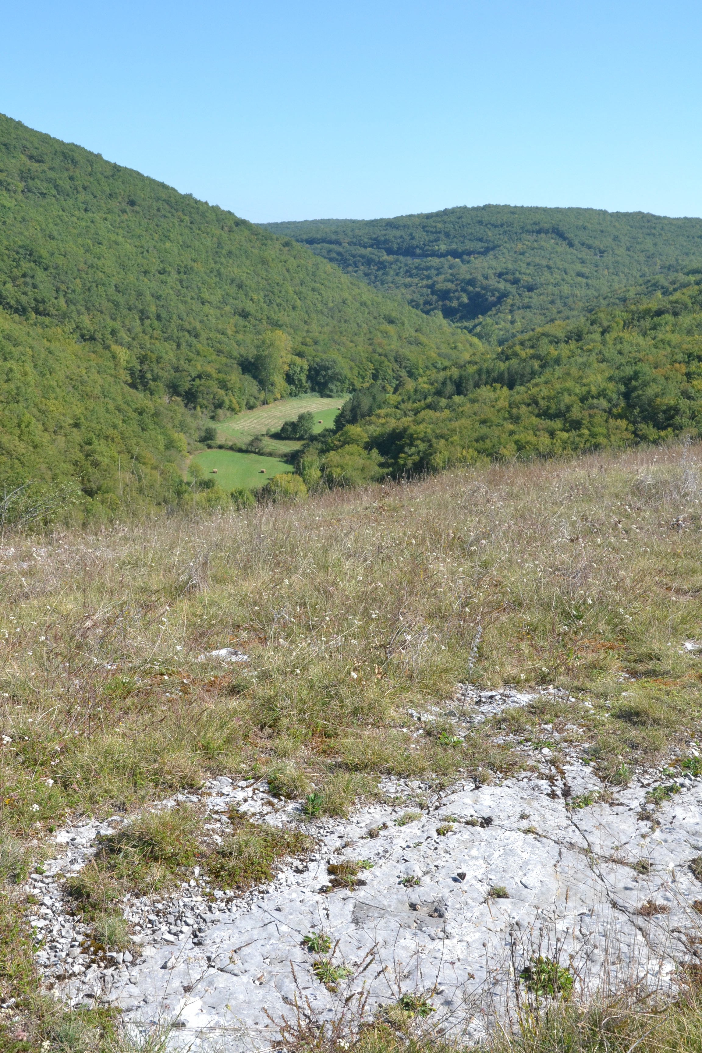 La côte pelée et la vallée du Blagour (Chasteaux, Corrèze, France).